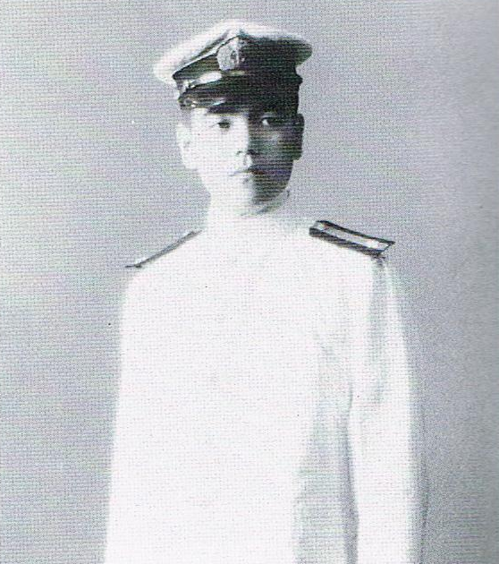 島尾敏雄海軍中尉